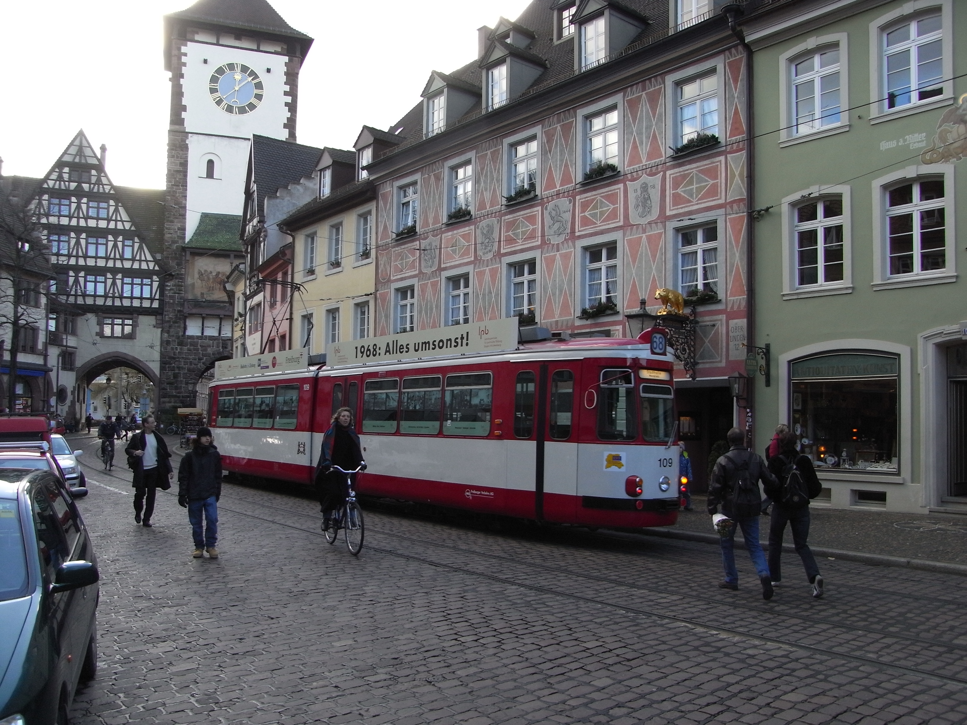 Die Bilder sind in Freiburg i. Br. bei einer Sonderfahrt des GT-4 aufgenommen worden Salzstraße Wegfahrt in Richtung Schwabentor